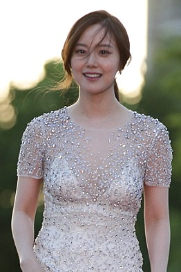 제19회 부천국제판타스틱영화제 레드카펫 part.3